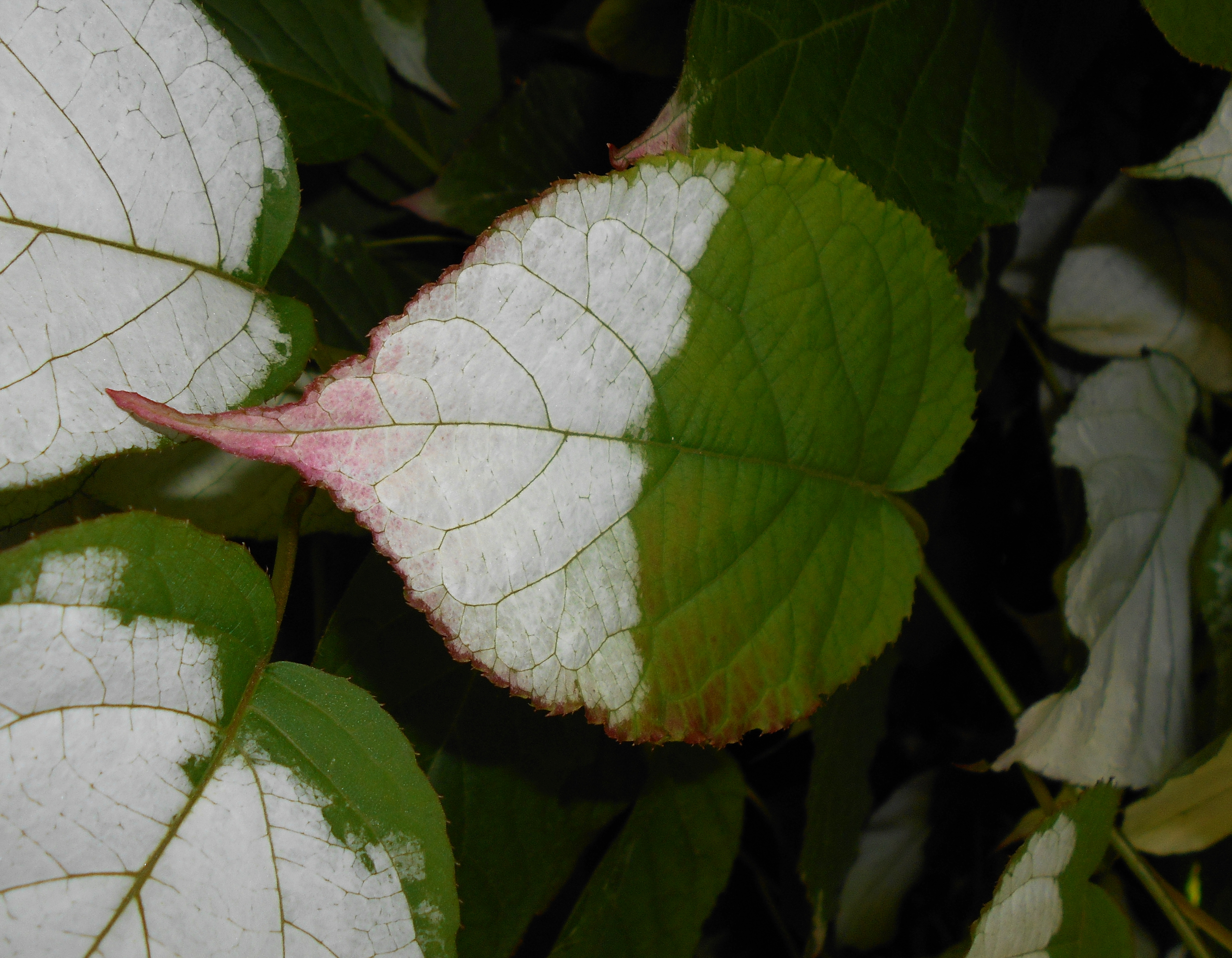 Aktinidia pstrolistna (Actinidia kolomikta), Ogród Botaniczny UMCS, Lublin, Polska.